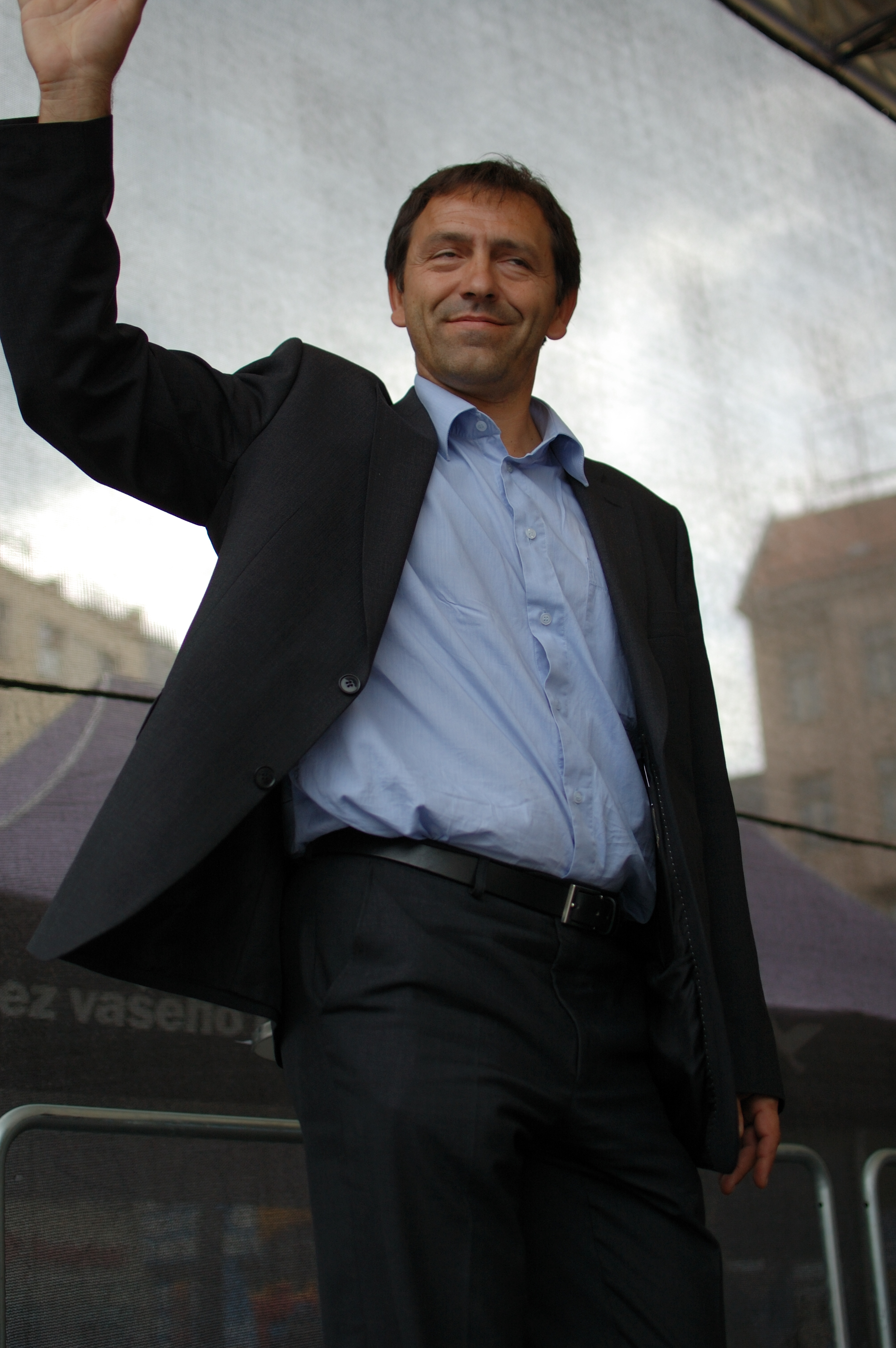 František Sivera